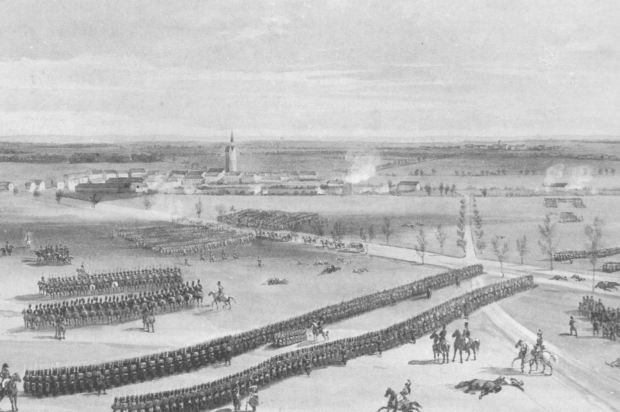 Combat de Mormant le 17 février 1814, à dix heures du matin (détail), par Jean Antoine Siméon Fort. Au premier plan, la Vieille Garde. Au second plan, l'infanterie du général Étienne Maurice Gérard se dirige vers Mormant, dont elle va chasser les Russes de Pahlen.